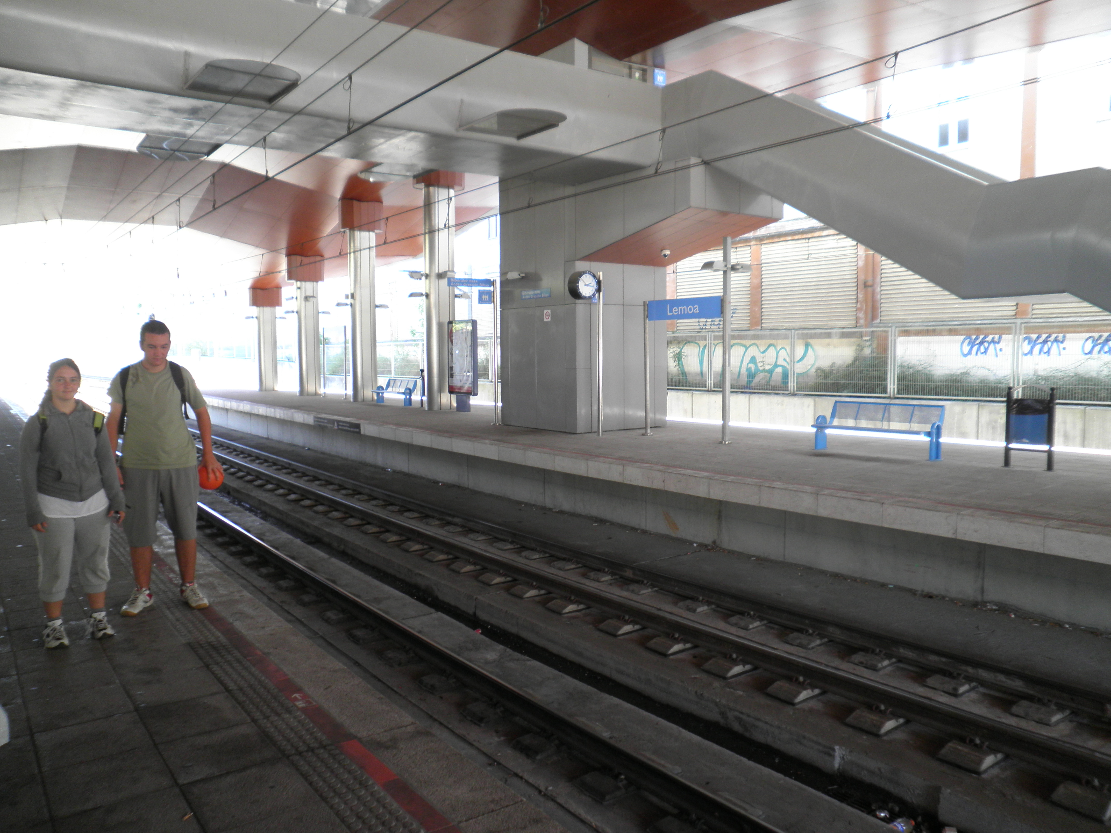 Lemoako geltokia. Euskotren.